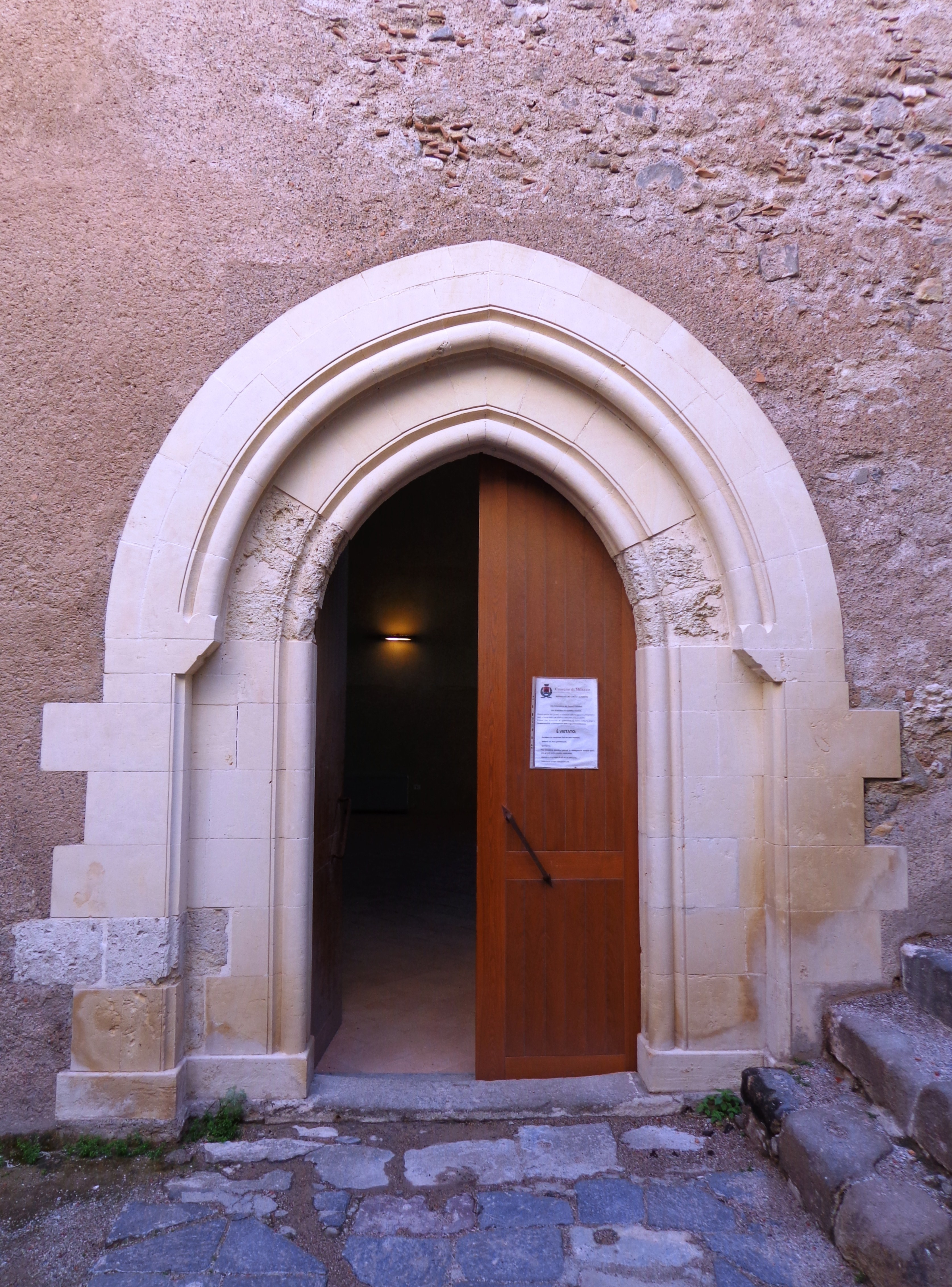 Castello